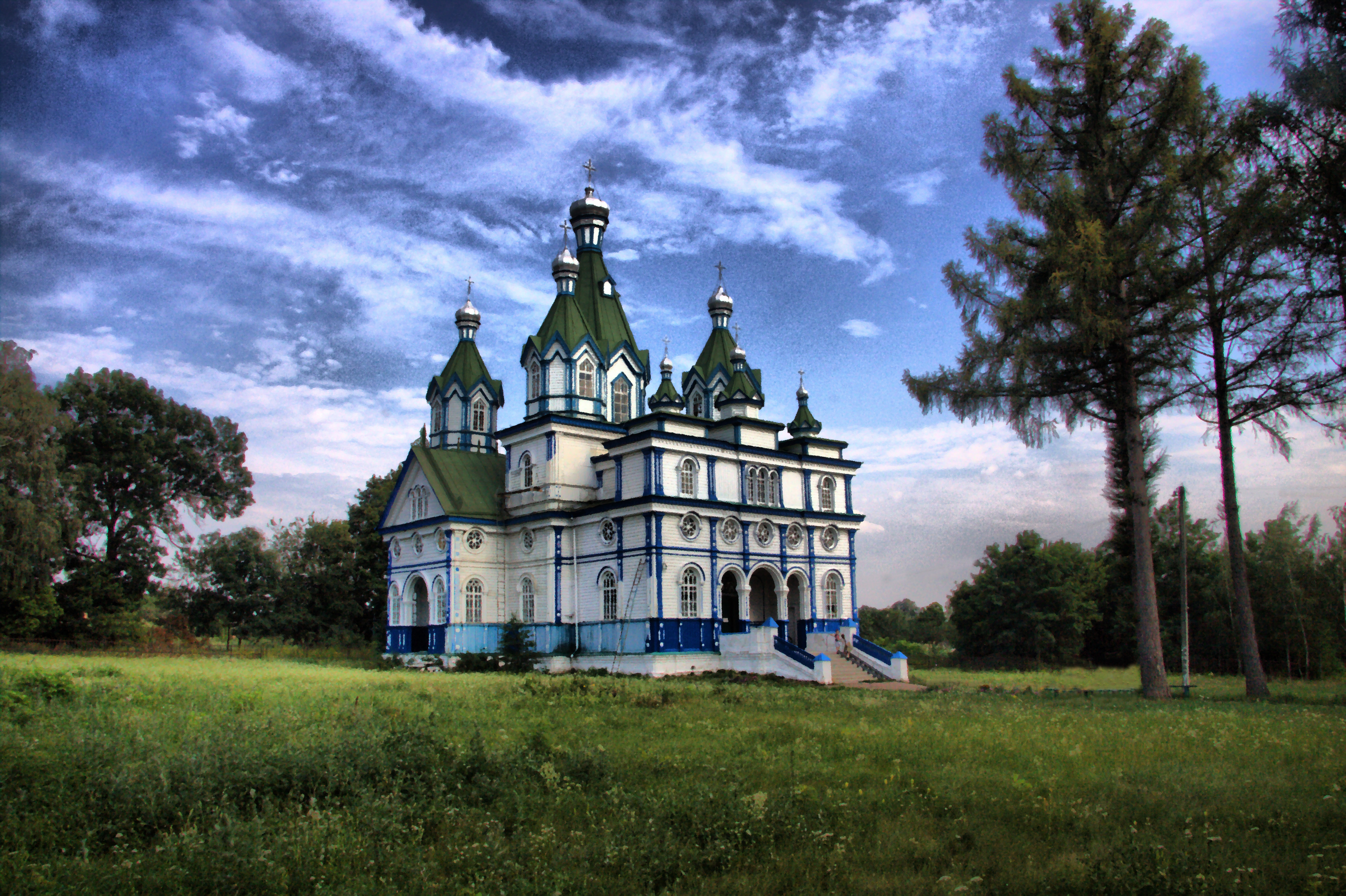 Успенська церква, с.Сильченкове